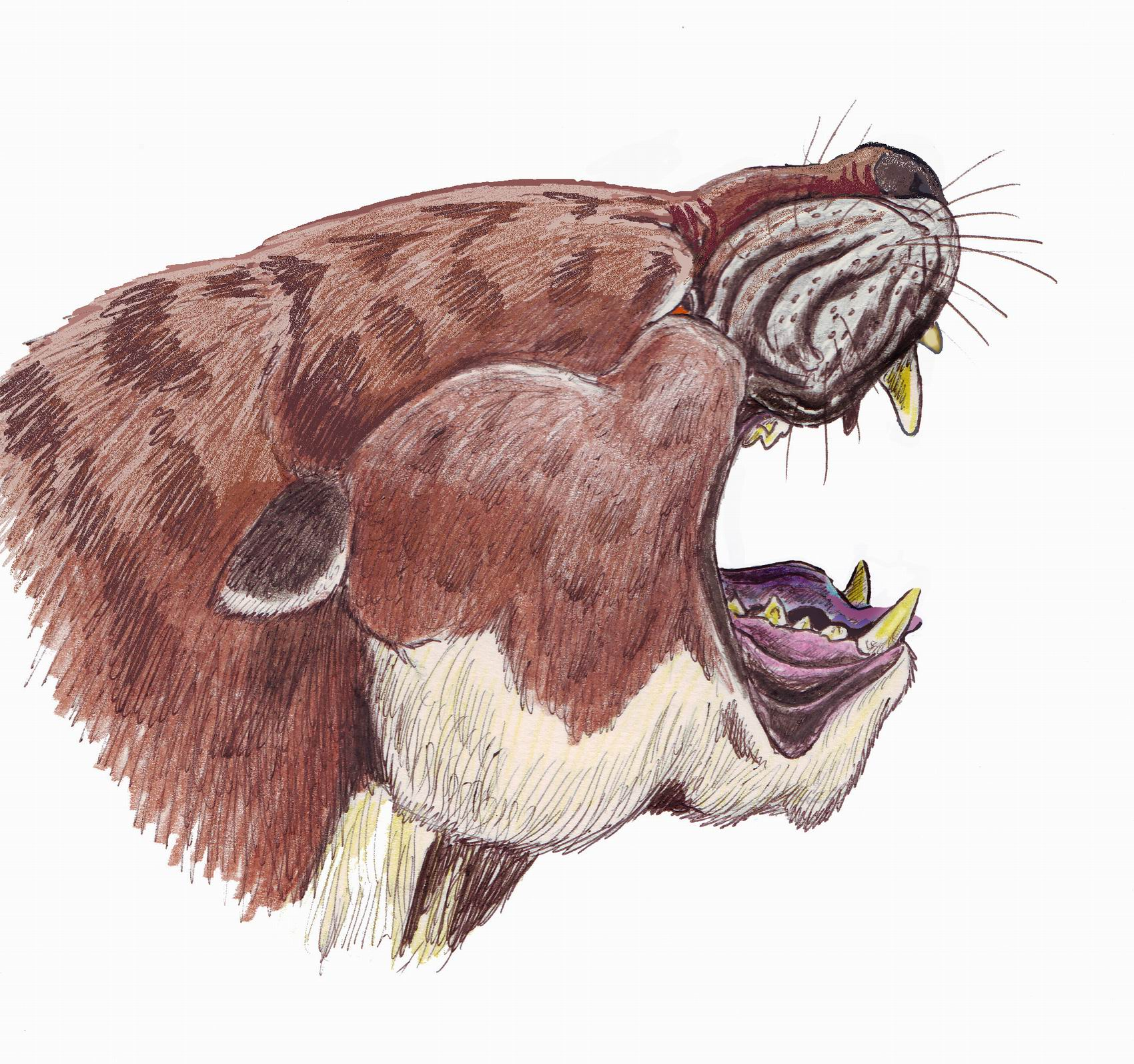 Sarkastodon mongolensis